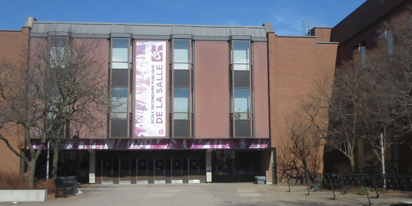 Détails de la façade de l'école. Avec son logo.